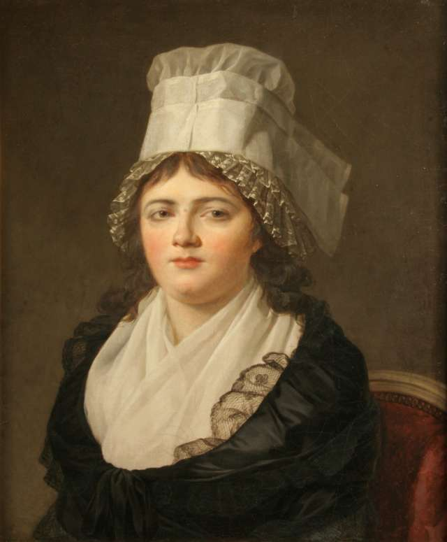 Portrait de Gabrielle-Antoinette Charpentier (1760-1793), première épouse de Danton.